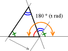 La somme des mesures des angles d'un triangle est l'angle plat. Ceci se montre facilement en traçant la parallèle à un des côté passant par le sommet opposé, et en considérant l'égalité des angles alterne-internes et des angles correspondants (c'est la preuve d'Euclide dans ses Éléments, I-32). Auteur : Christophe Dang Ngoc Chan, réalisé avec un programme de dessin vectoriel. Licence GFDL Christophe Dang Ngoc Chan